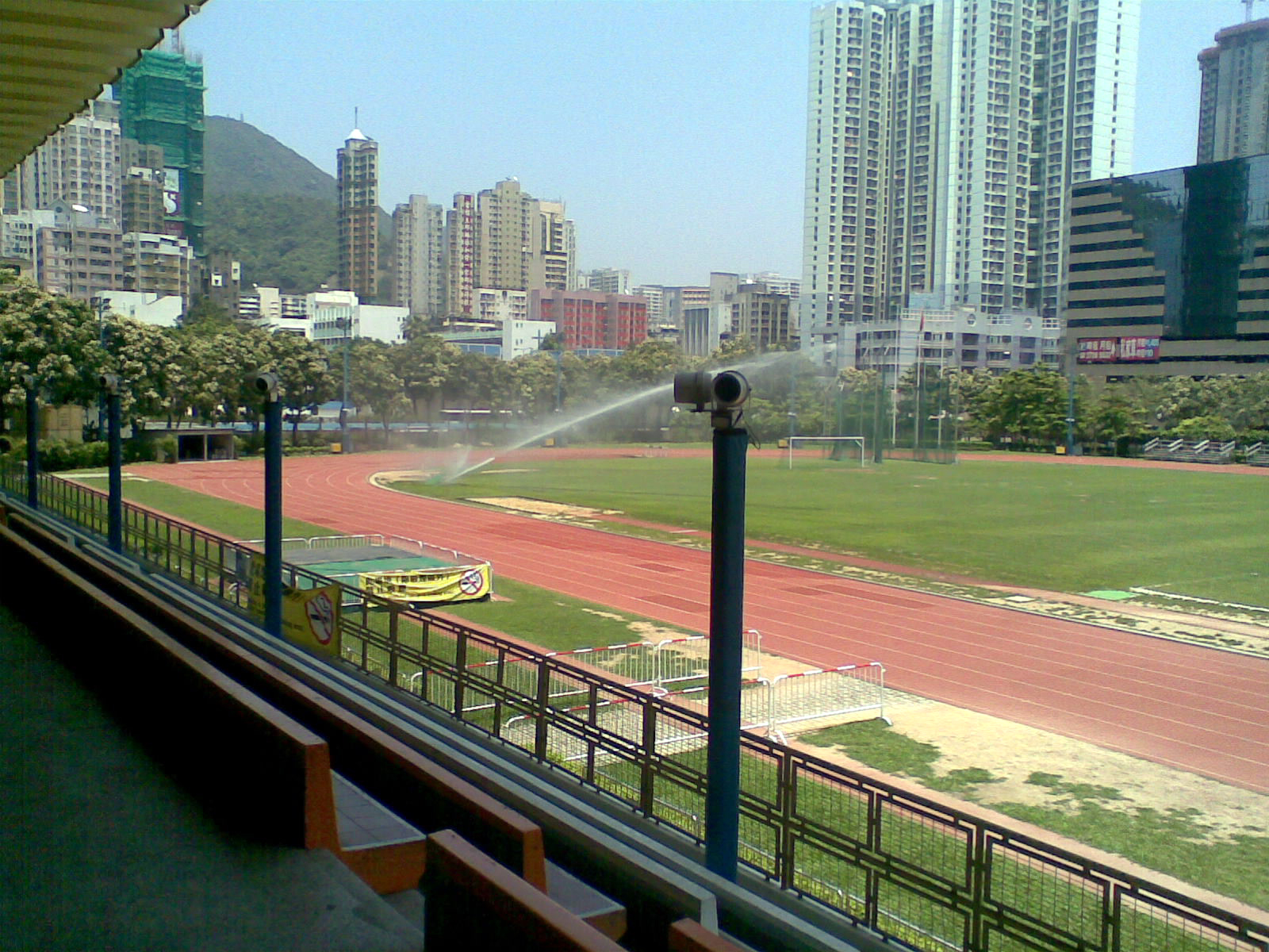 深水埗運動場